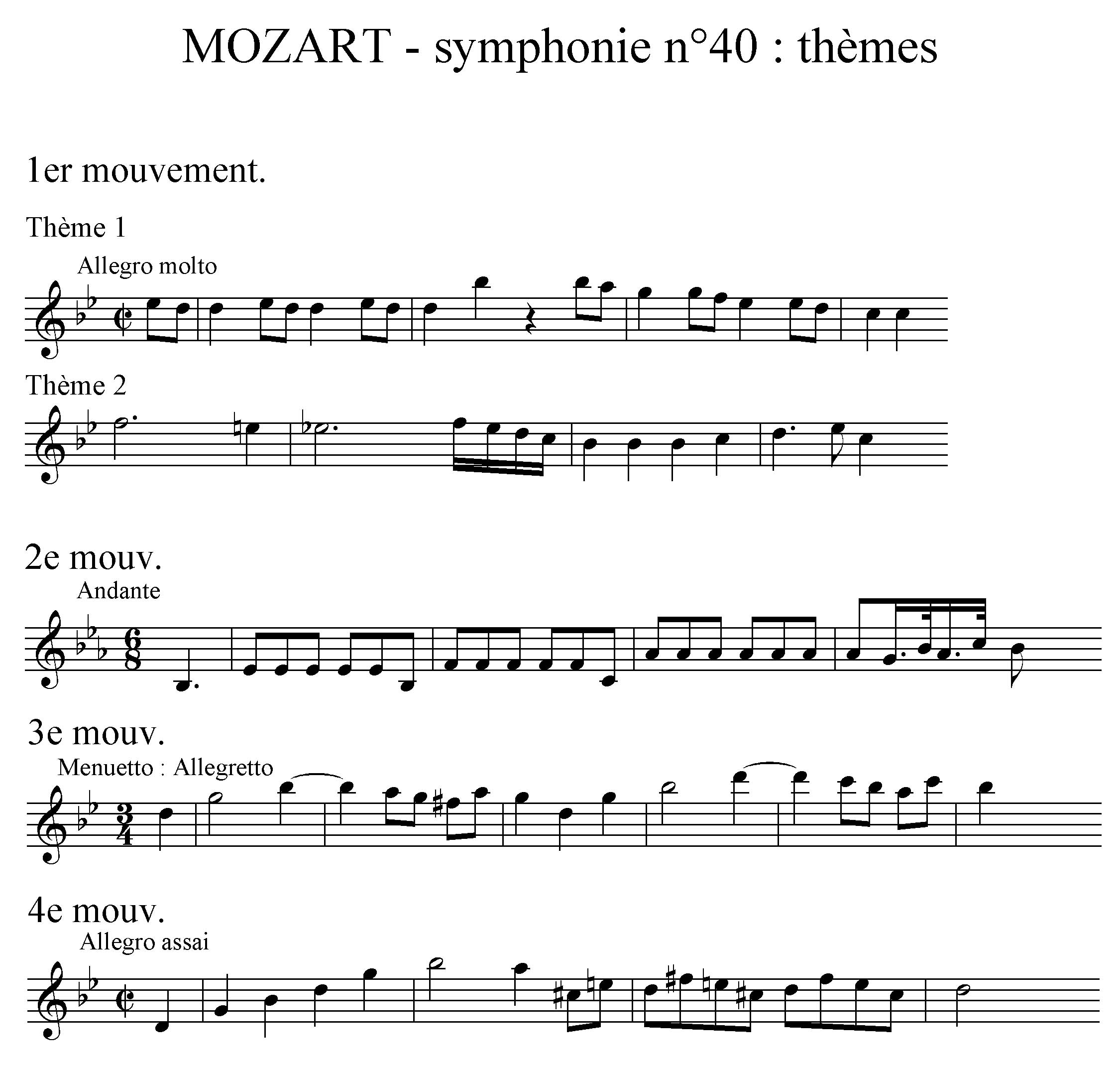 Symphony no. 40, KV 550